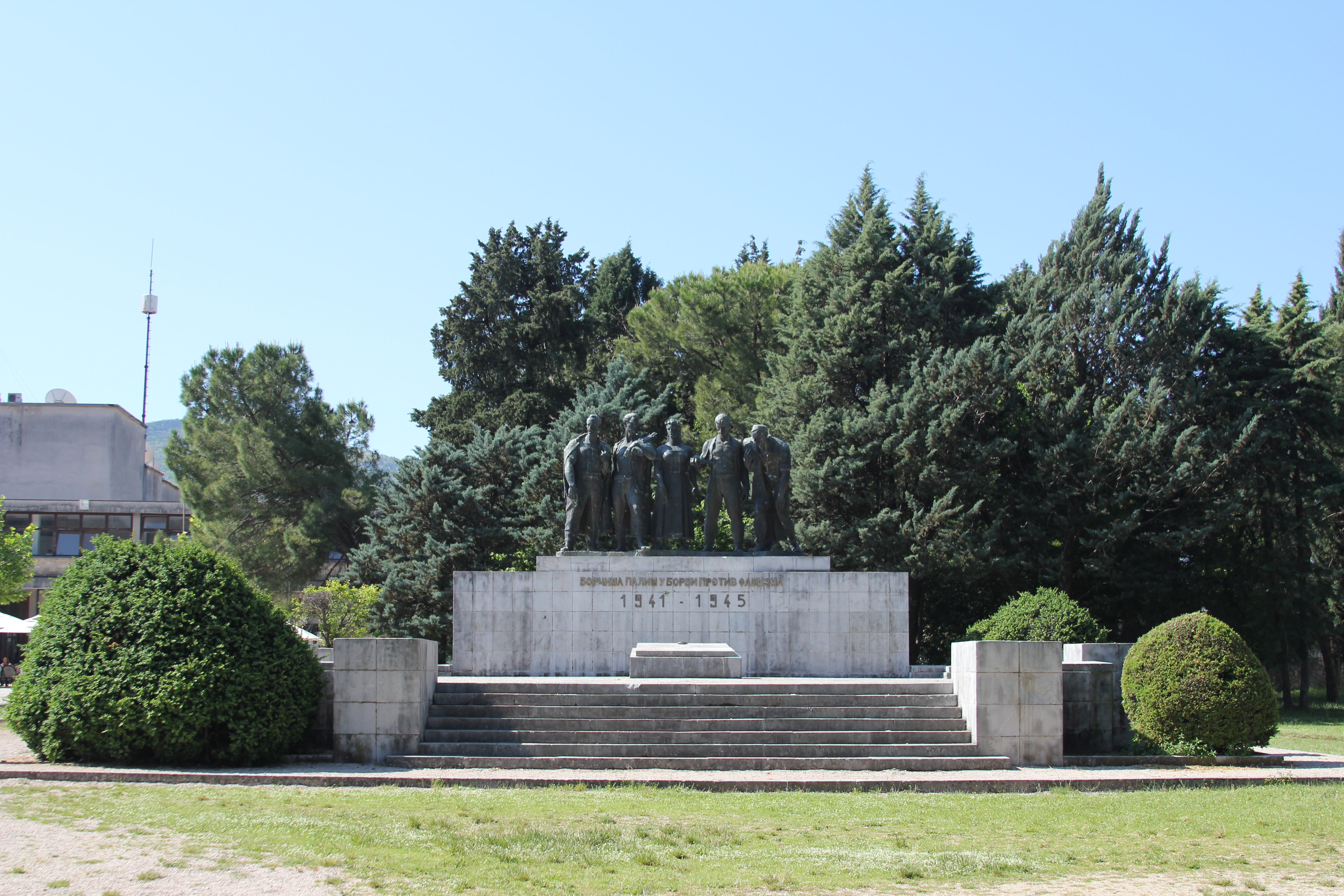 Trebinje- Spomenik borcima palim u borbi protiv fašizma 1941-1945